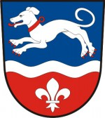 Česky: Labské Chrčice